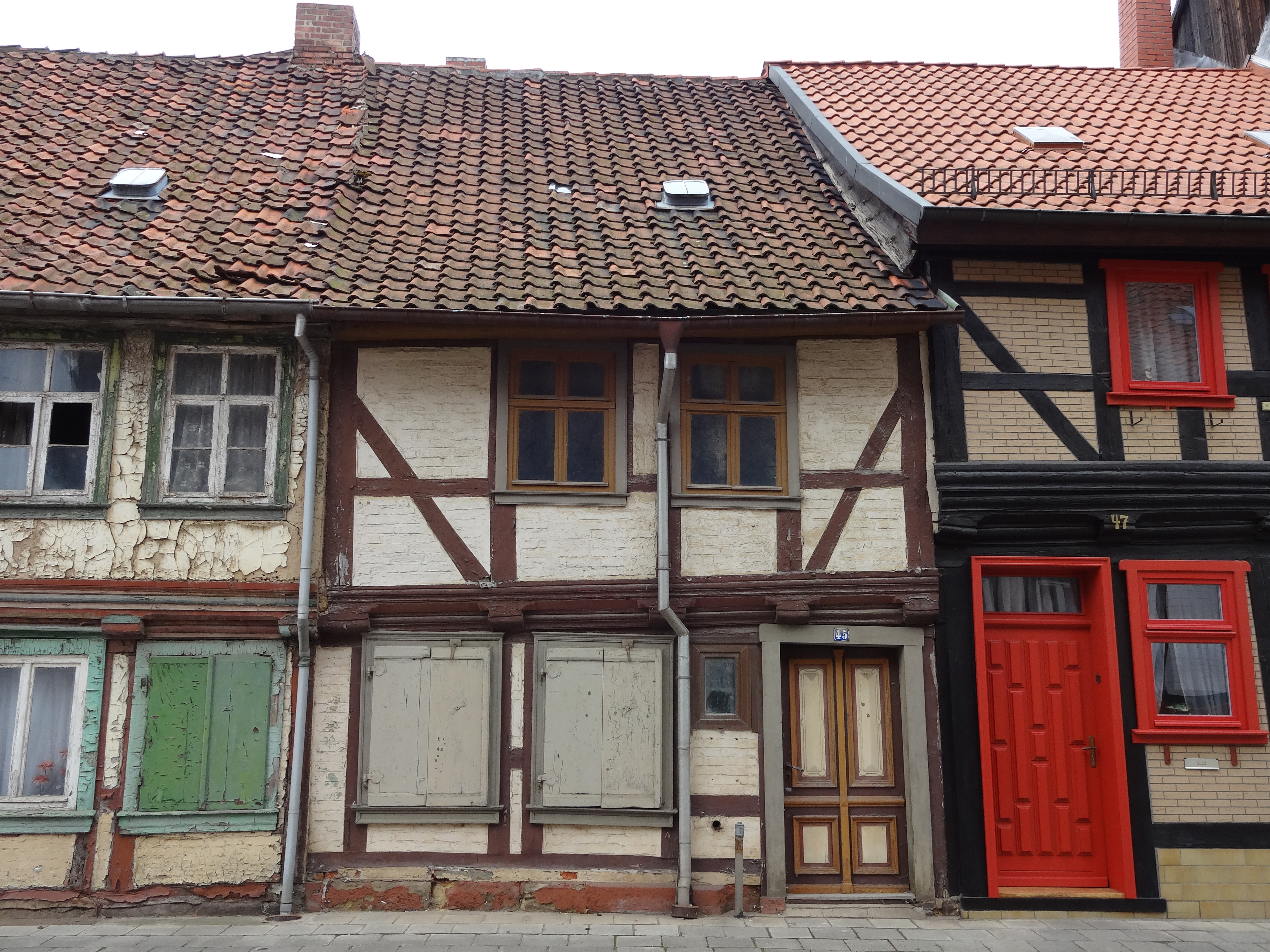 denkmalgeschütztes Fachwerkhaus in der Kornstraße 45 in Derenburg, Ortsteil von Blankenburg (Harz)